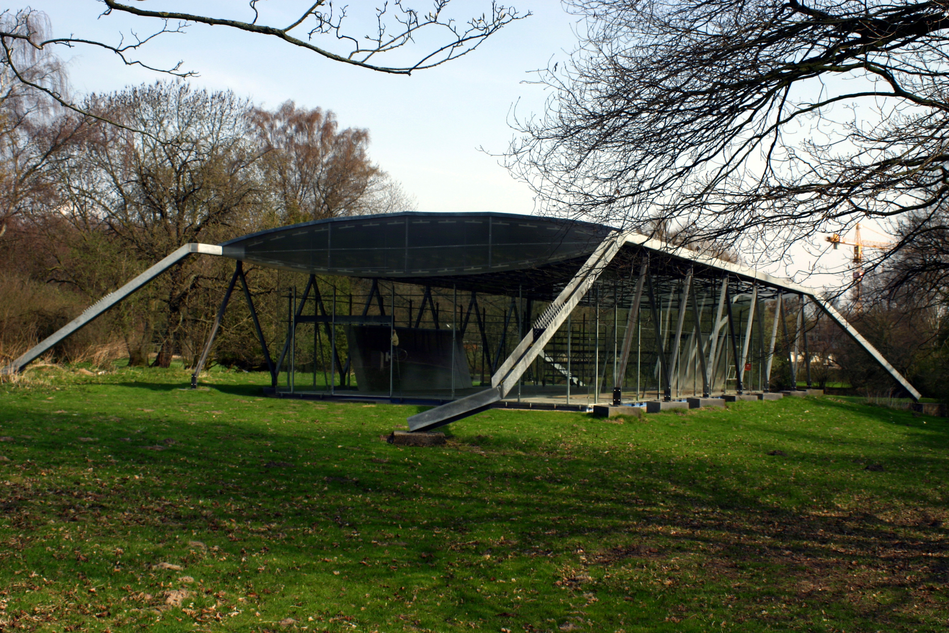 Der 1987 für die documenta 8 in Kassel von Stefan Wewerka entworfene Pavillon wurde ein Jahr später in Münster in der Nähe des Aasees aufgebaut.